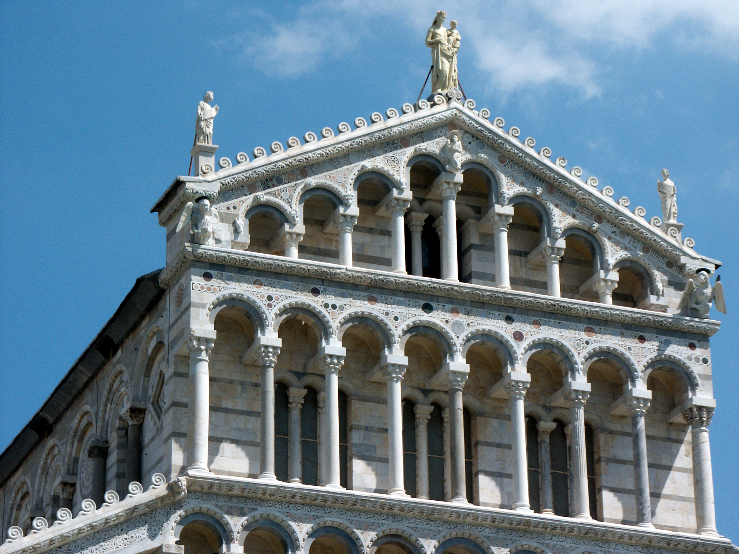 Colonnes de la Cathédrale de Pise